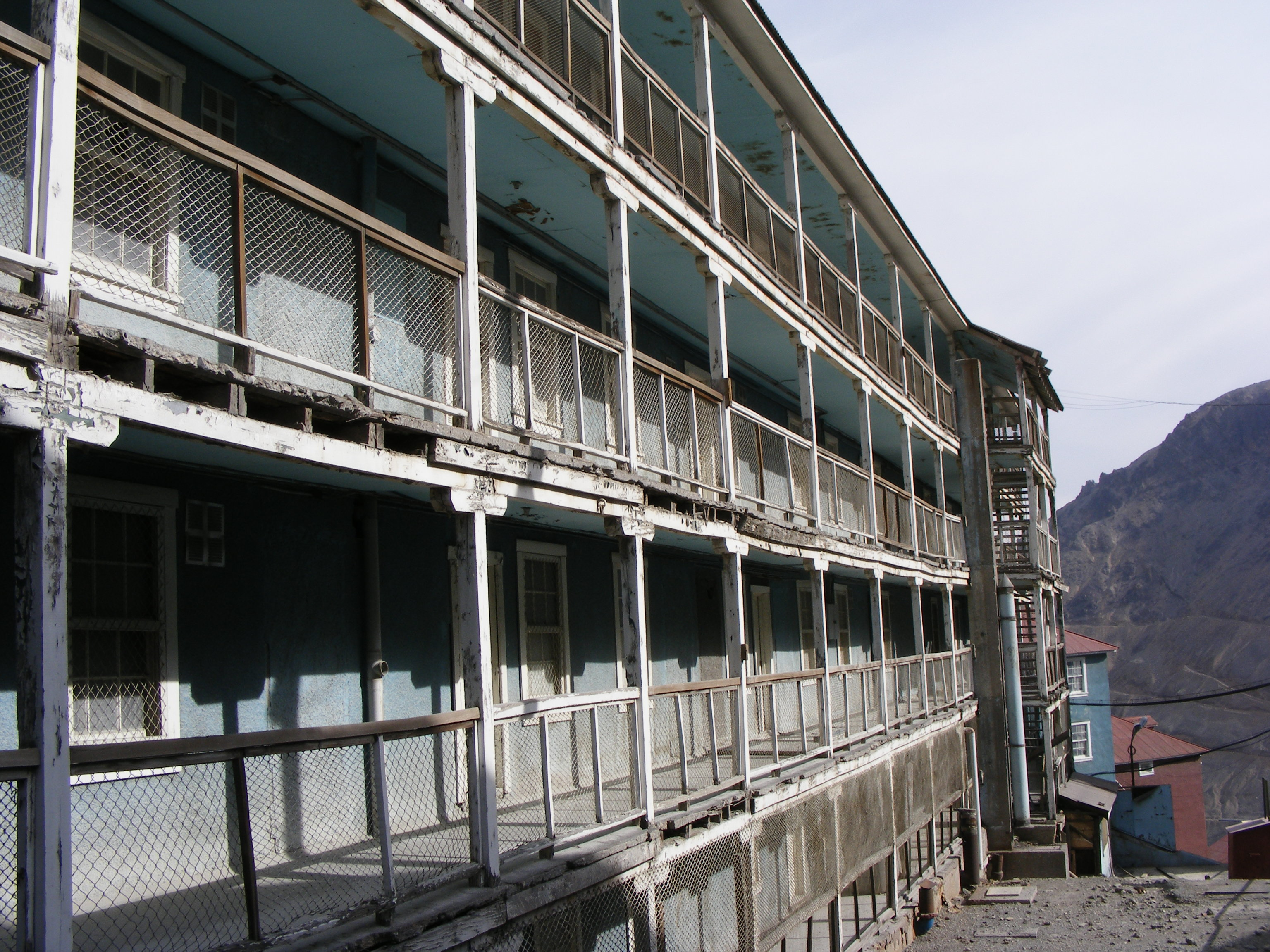 Campamento Sewell: Bellísimo lugar, preferente en época invernal. La nieve le da un toque especial. Por lo bien conservado que se encuentra, cuesta creer que tenga tantos años This is a photo of a national monument in Chile: 139